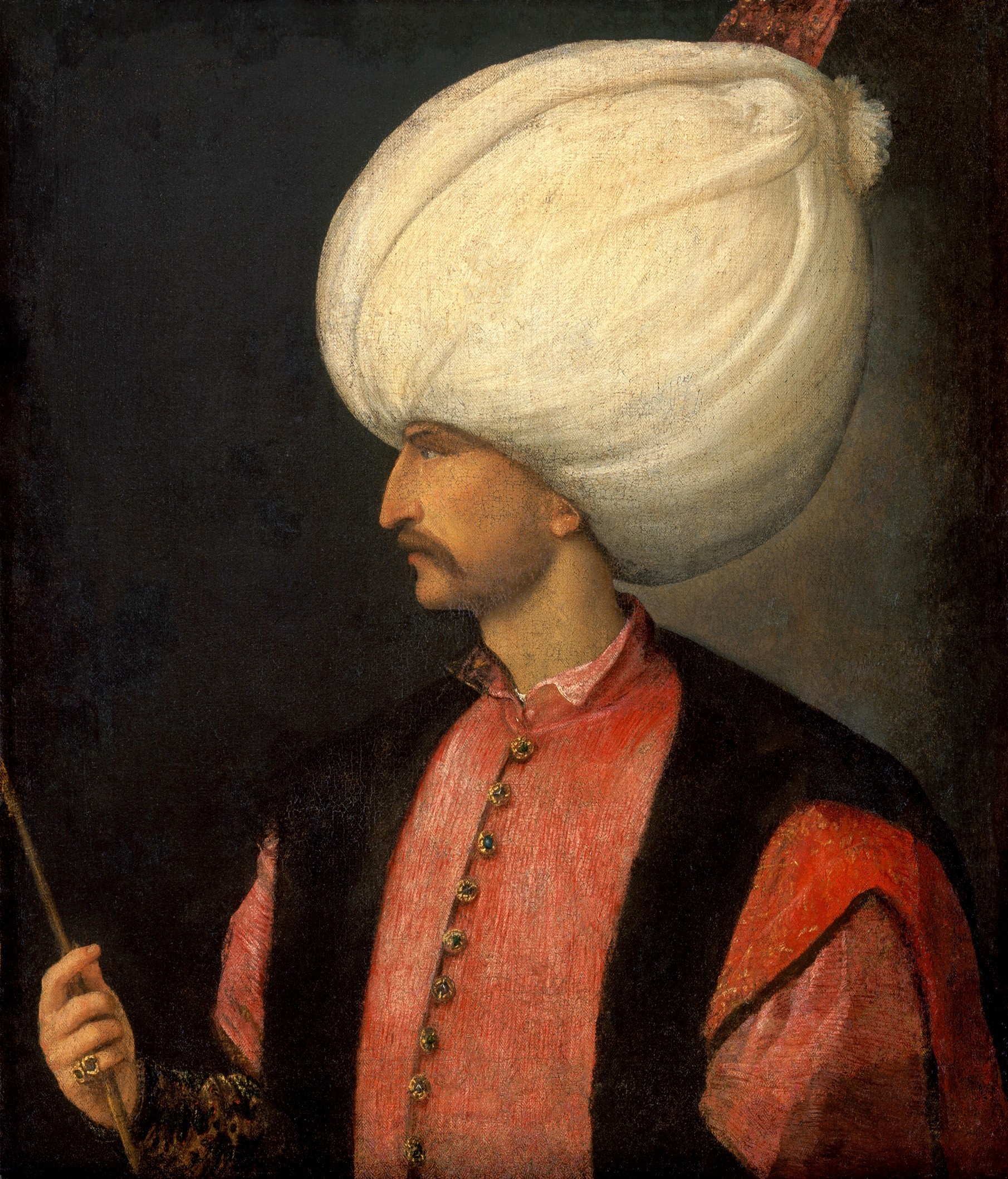 Delle tre versioni del ritratto di Solimano, ricordate dalle fonti come «di mano di Tiziano», ne sono giunte fino a noi solo due, iconograficamente diverse tra loro, ma entrambe riferibili alla bottega di Tiziano, piuttosto che alla sua mano. Ciò che per altro non vorrebbe dir nulla, perché molte opere di bottega venivano licenziate come autografe. Il primo ritratto di Solimano di stile tizianesco proviene dalla collezione dell’arciduca Ferdinando II d’Austria ed è registrato nell’inventario del castello di Ruhelust, nel 1596. Il quadro è stato esposto alla Mostra di Vienna nel 2007 come copia da Tiziano (Kunsthistorisches Museum, Gemäldegalerie, Inv.-Nr. 24291).